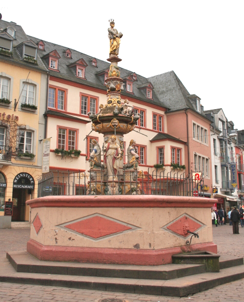 Péitrussprangbur op der Tréierer Maartplaz.